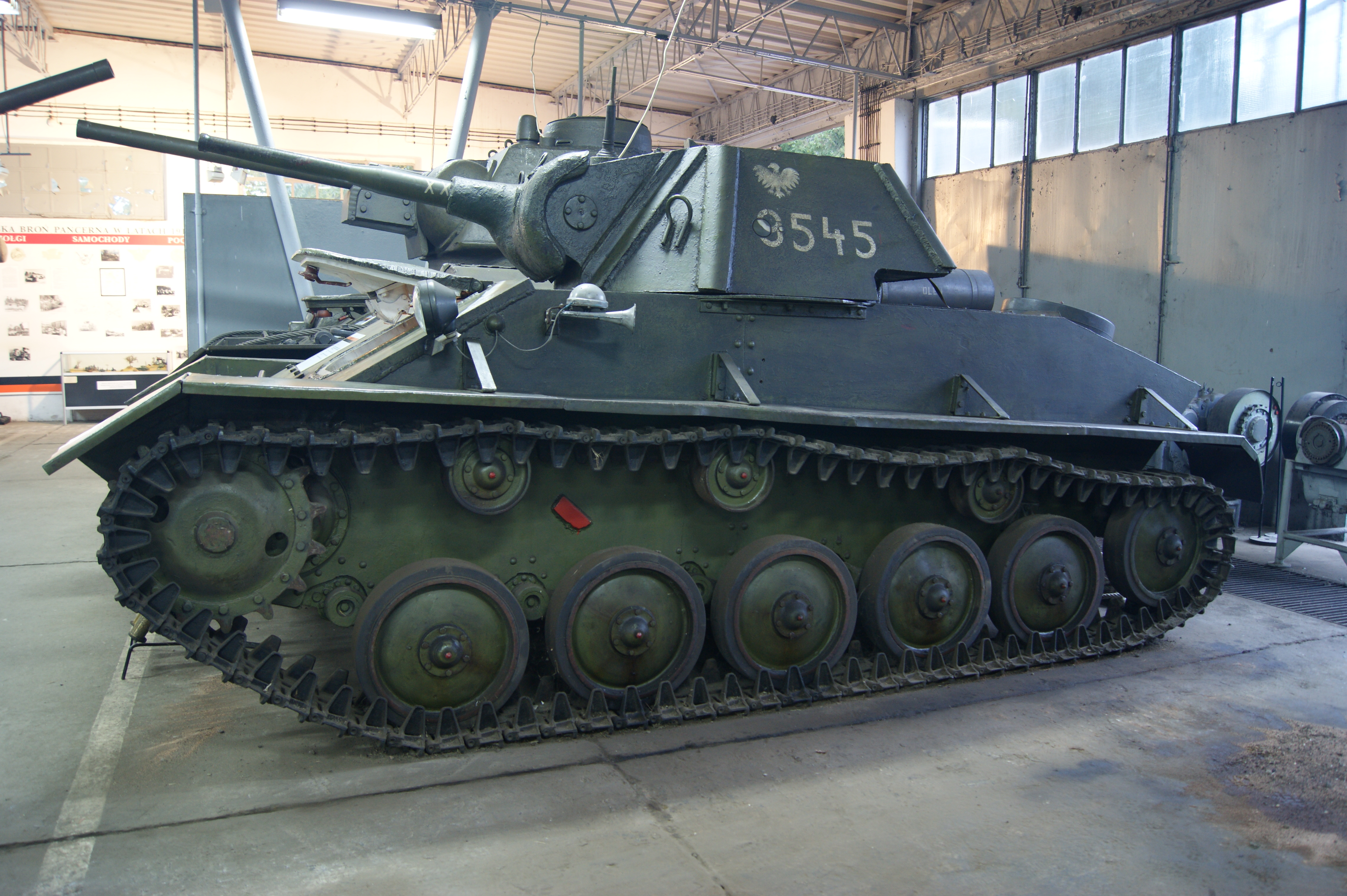 T70 Muzeum Broni Pancernej CSWL w Poznaniu